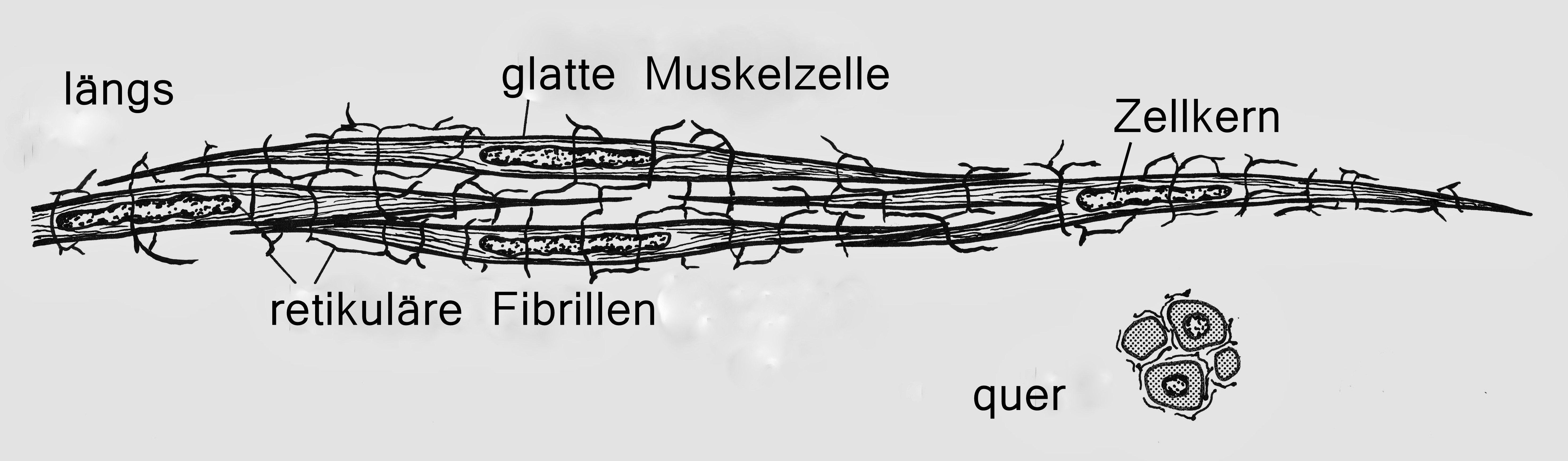 Schematische Darstellung des glatten Muskelgewebes im Längs und Querschnitt